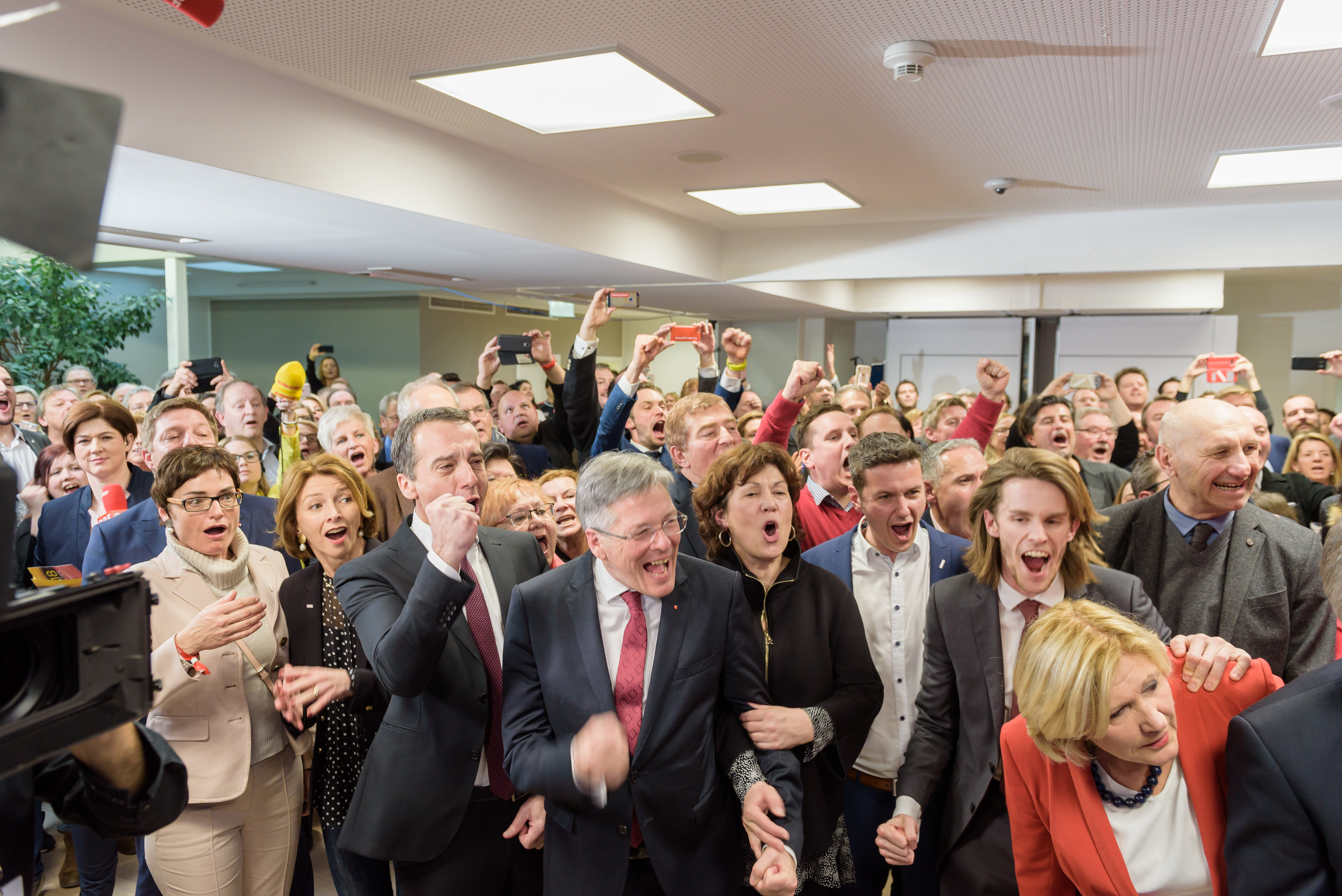 LT-Wahlsieg Kärnten